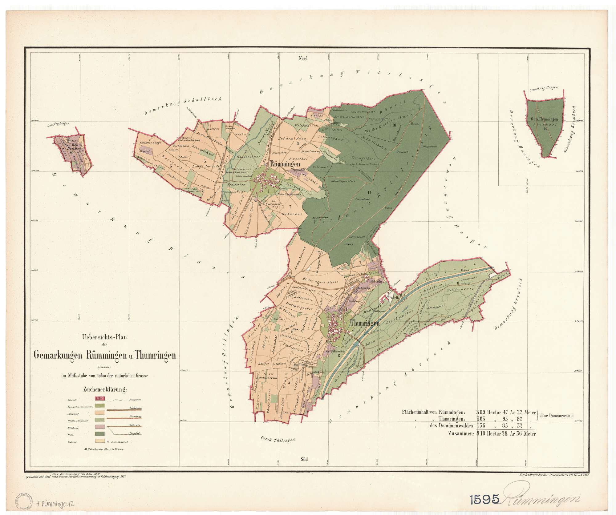 Gemarkungsplan von Rümmingen und Tumringen (1870)